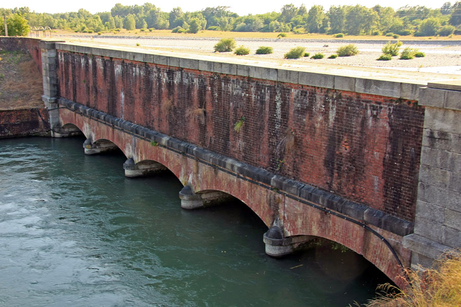 Uscita del Canale Cavour dal passaggio sotto il fiume Sesia tra Recetto (NO) e Greggio (VC)